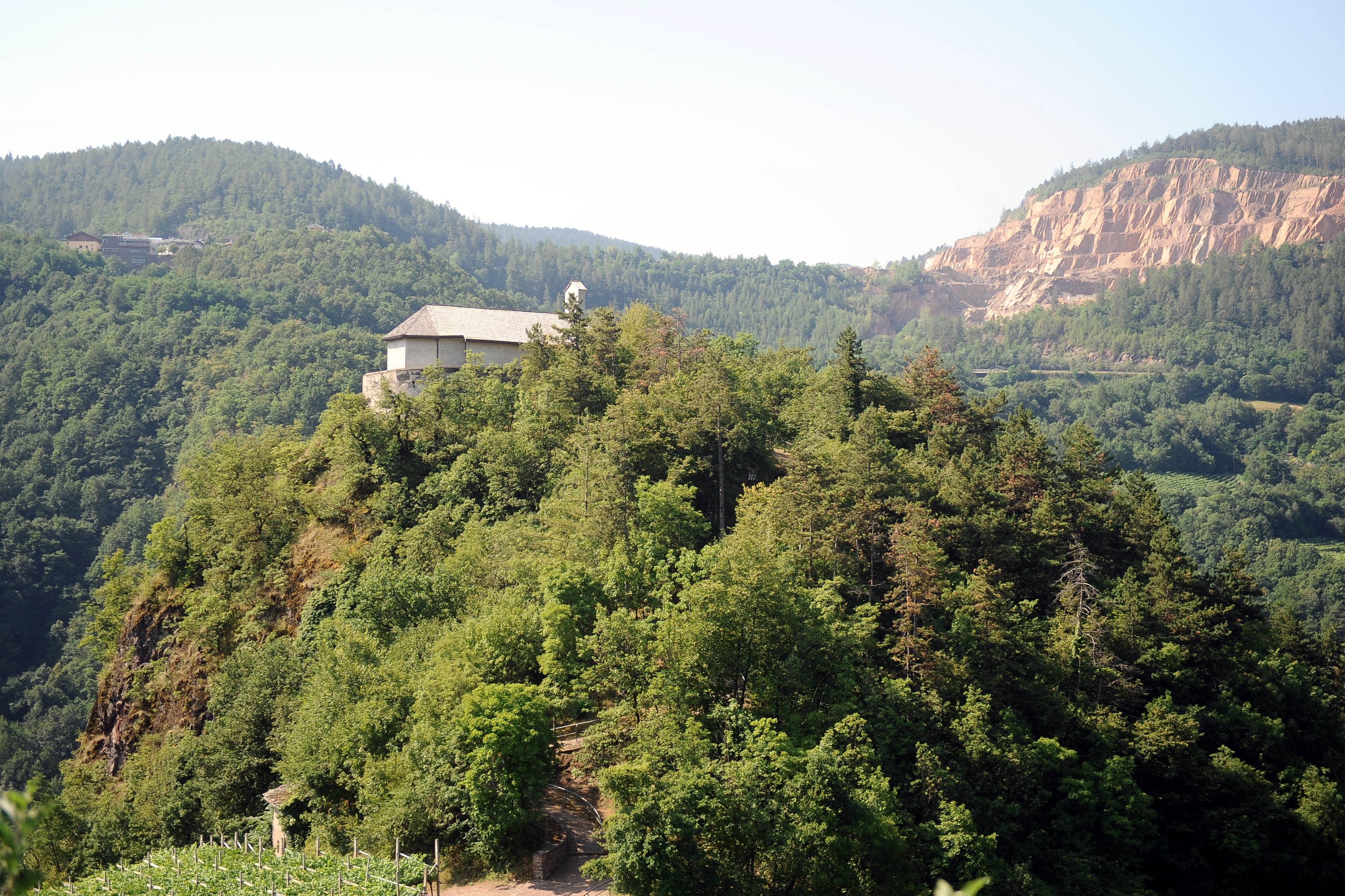 Chiesa di San Leonardo a Lisignago.